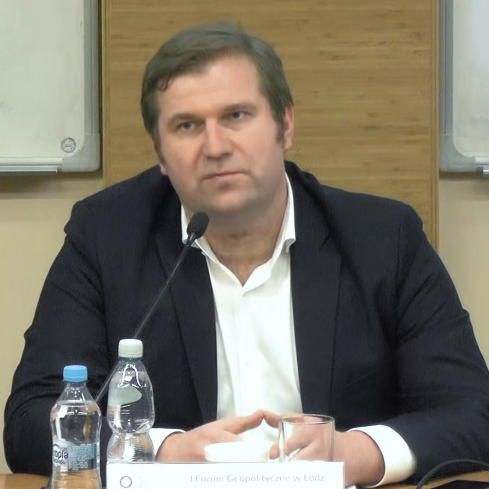 Radosław Pyffel, socjolog i dziennikarz.